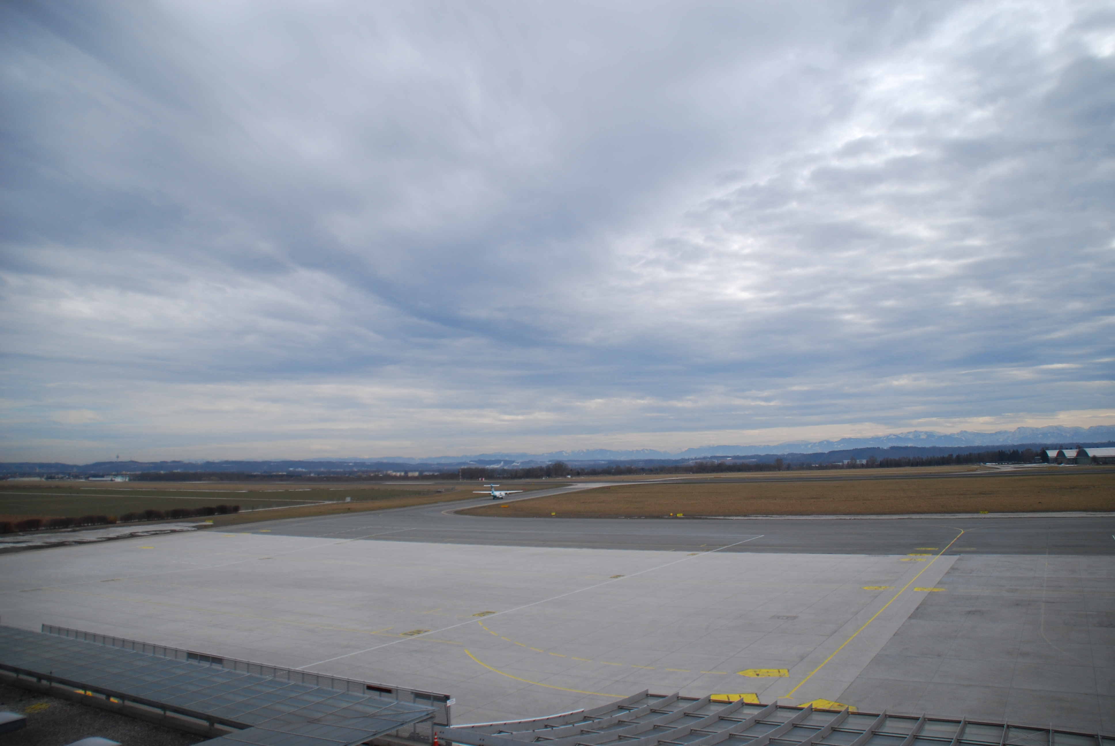 Blick auf die Landebahn